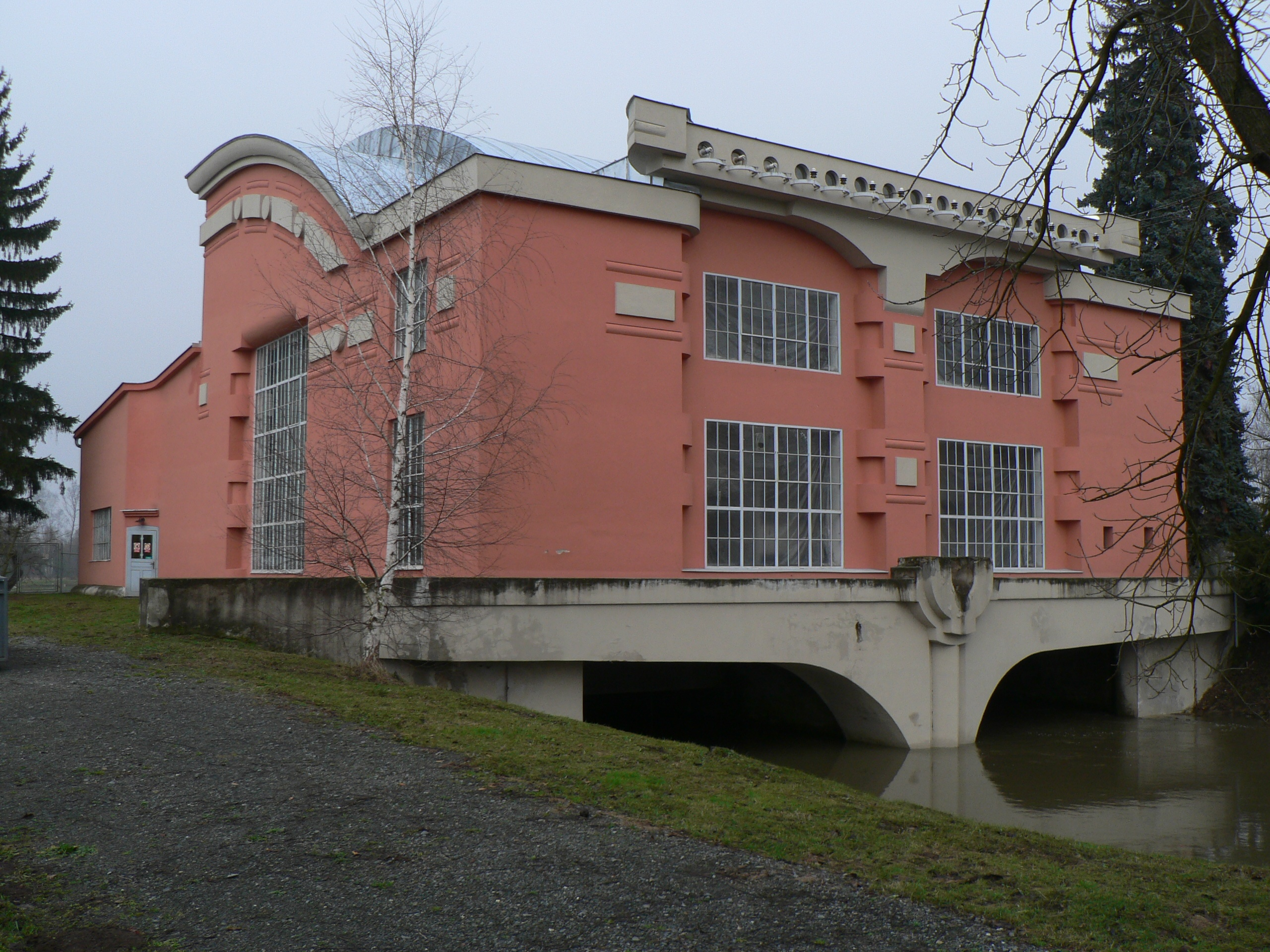 Elektrárna u Třeštiny, národní kulturní památka.